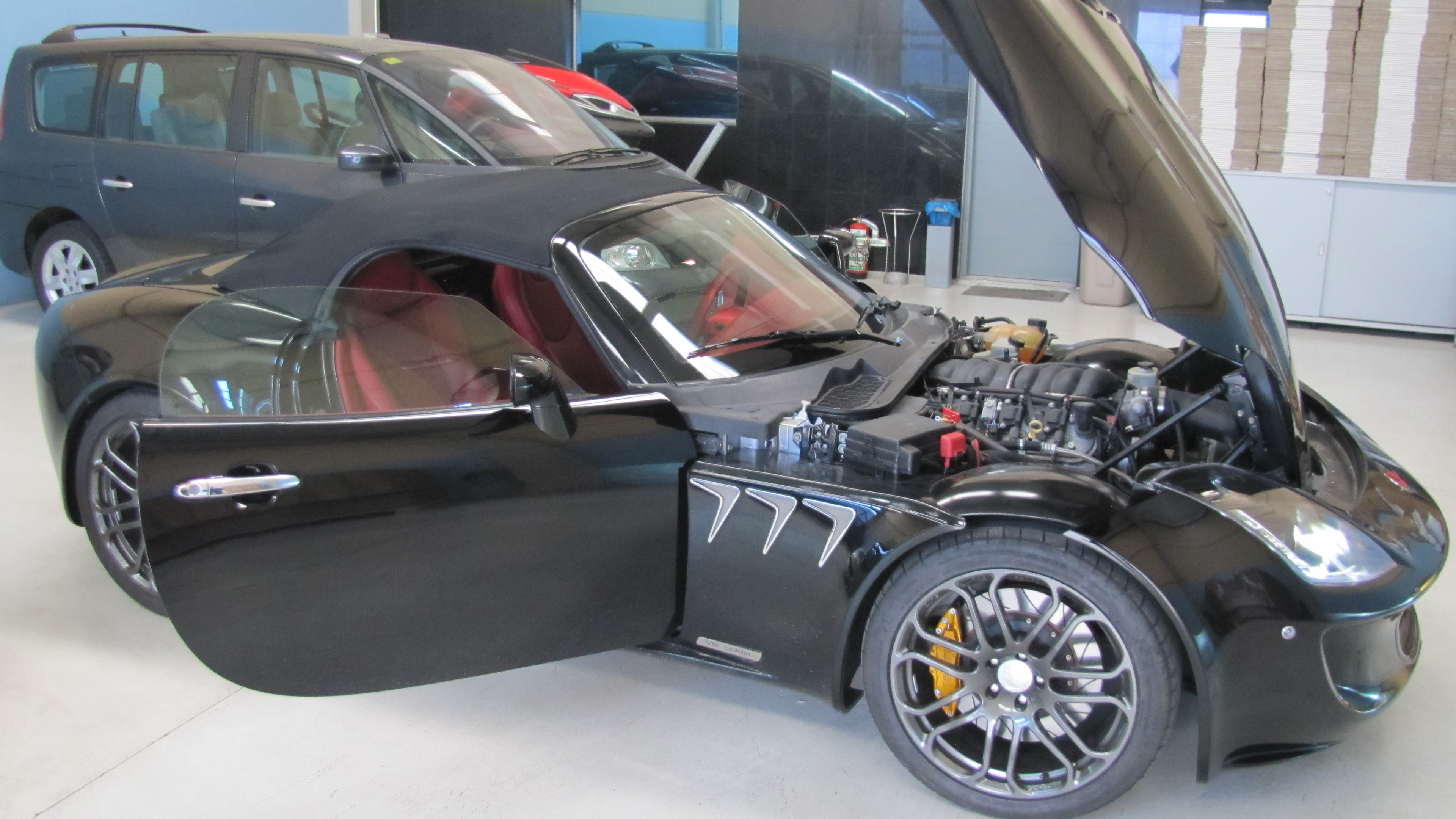 Automóvil deportivo Tauro Sport Auto Spider V8 negro